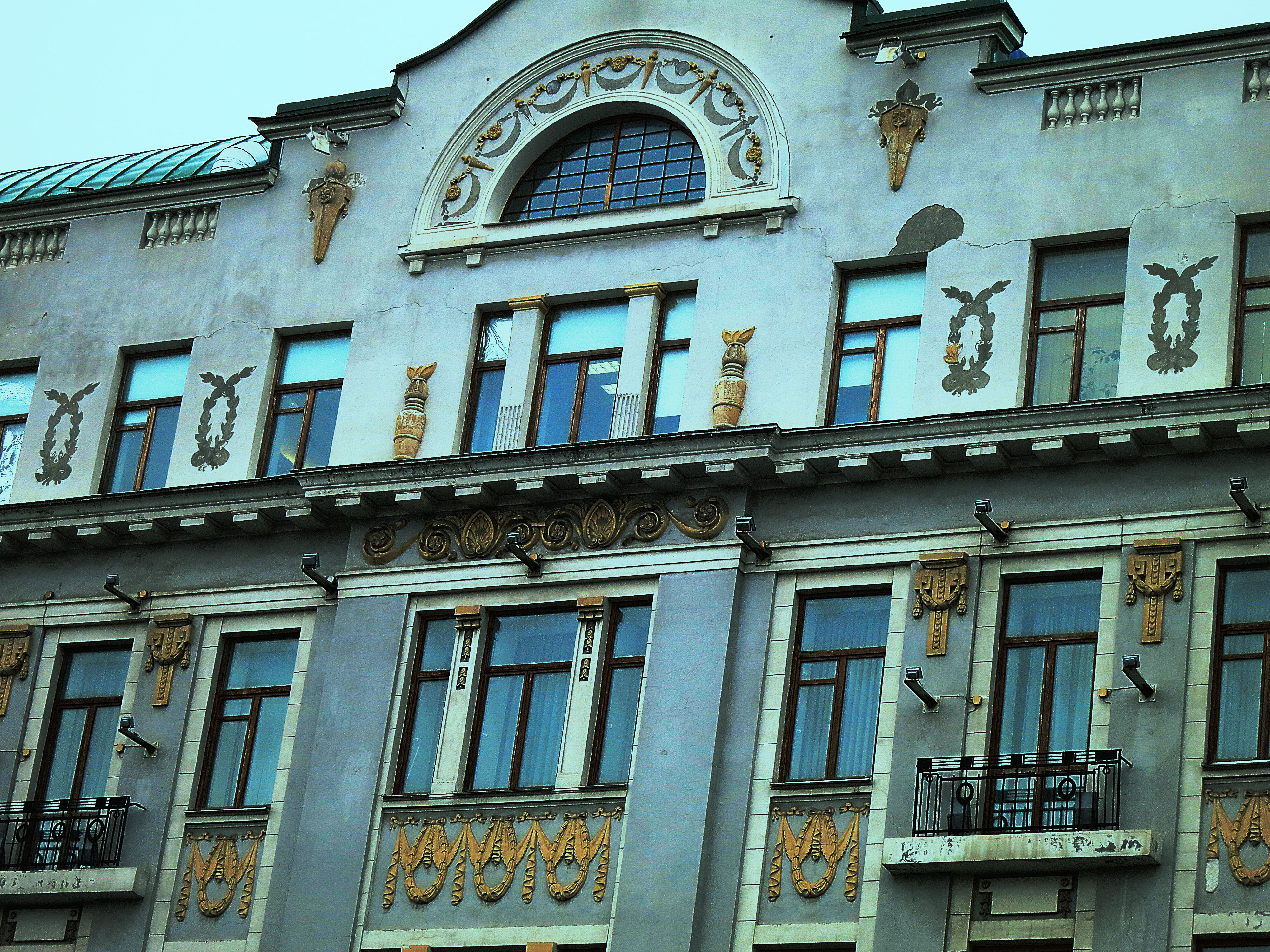 Дом м. в. ширмана (Ростовская область, Ростов-на-Дону, ворошиловский проспект, 20)